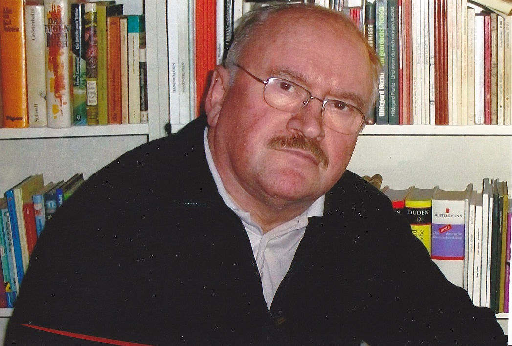 Das Foto ist von der Rückseite des Buhes "Wr laut denkt, lebt ghefährlich". Aphorismen und Notate. Erschienen im Stadthaus-Verlag